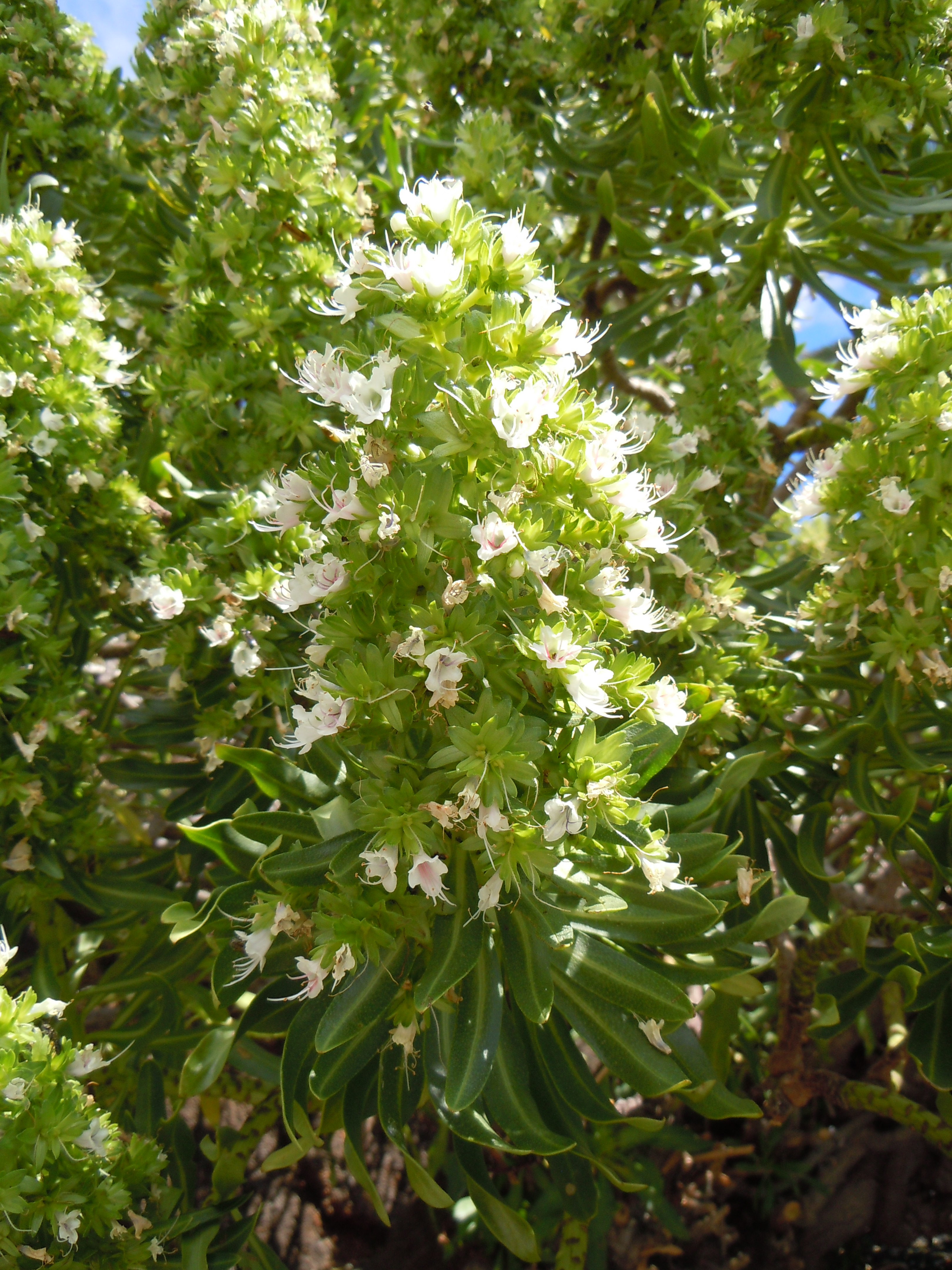 Echium decaisnei subsp. purpuriense Bramwell, Jameos del Agua, Lanzarote